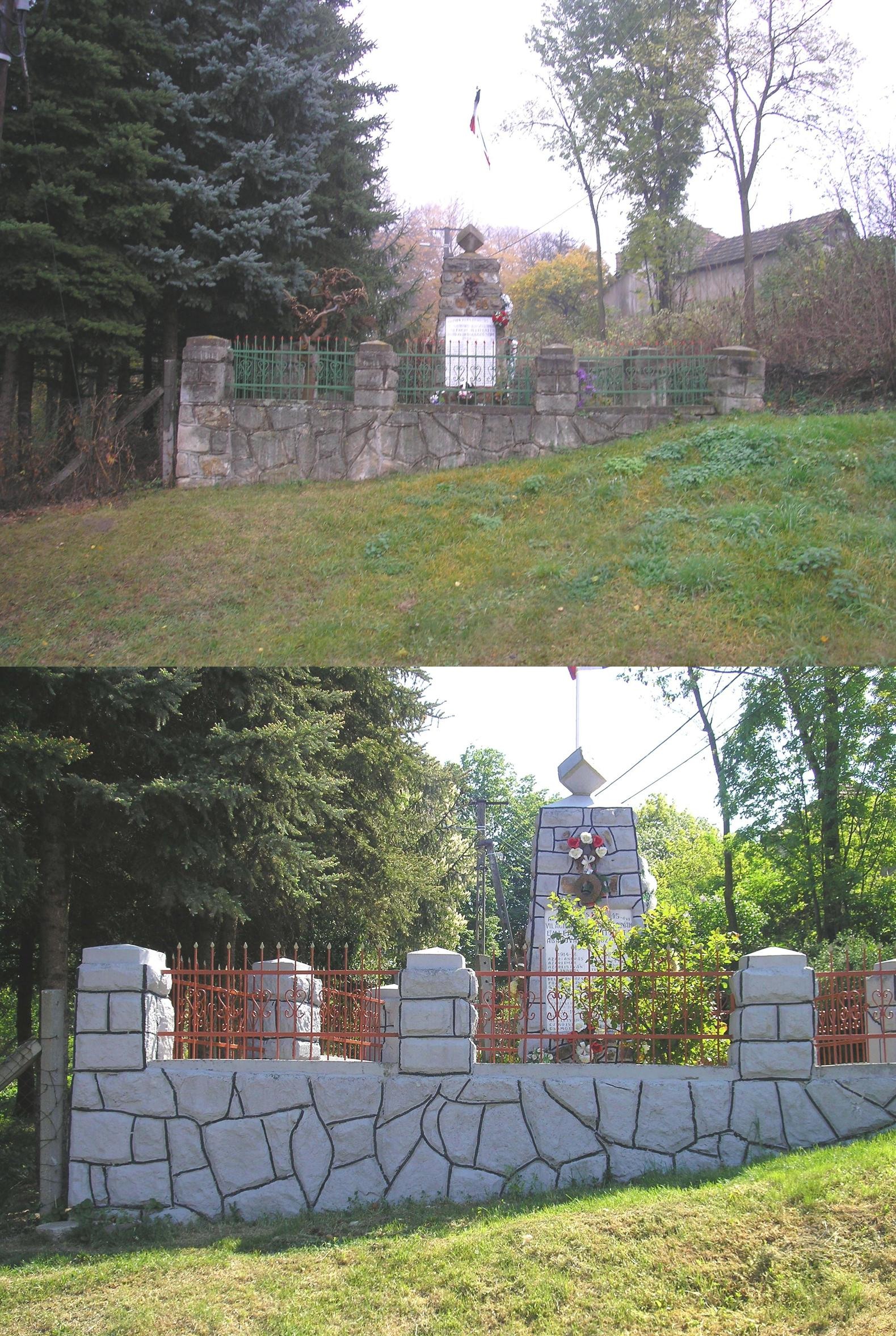 Az abaújvári világháborús emlékmű felújítás előtt és után (Abaújvár)